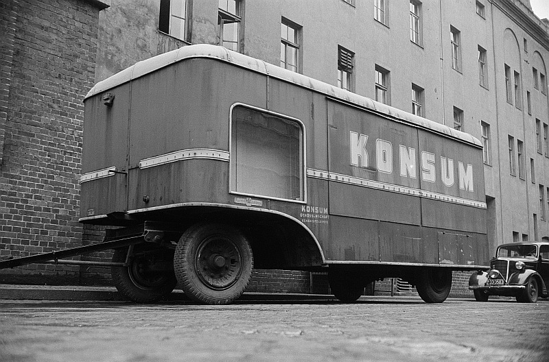 Original image description from the Deutsche FotothekKonsum-Verkaufswagen